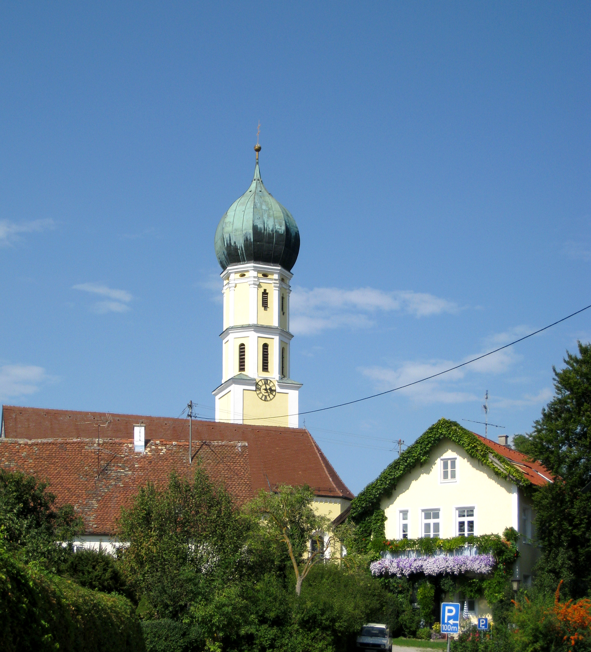 Die Sankt Anna Kirche in Schondorf, Ortsteil Oberschondorf, mit der alten Schule links im Vordergrund